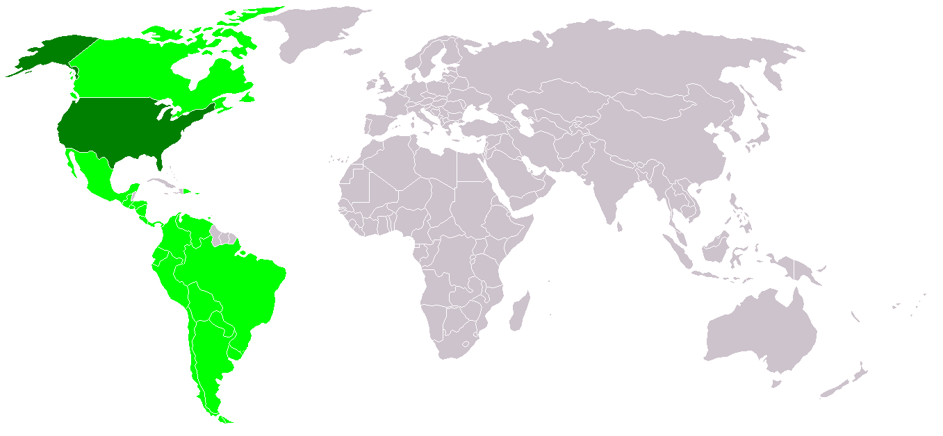 Mapa de participantes en la Cumbre de las Américas. En verde oscuro los estados Unidos, impulsor de las medidas que dicta la organización. En más claro el resto.